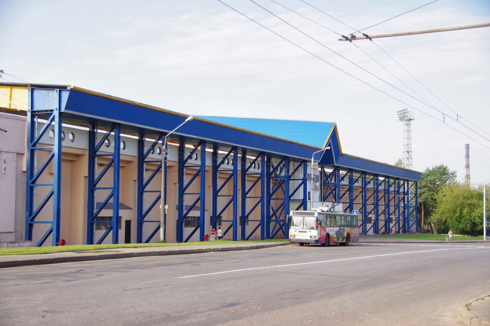 Кiрава, Магілёў, Belarus